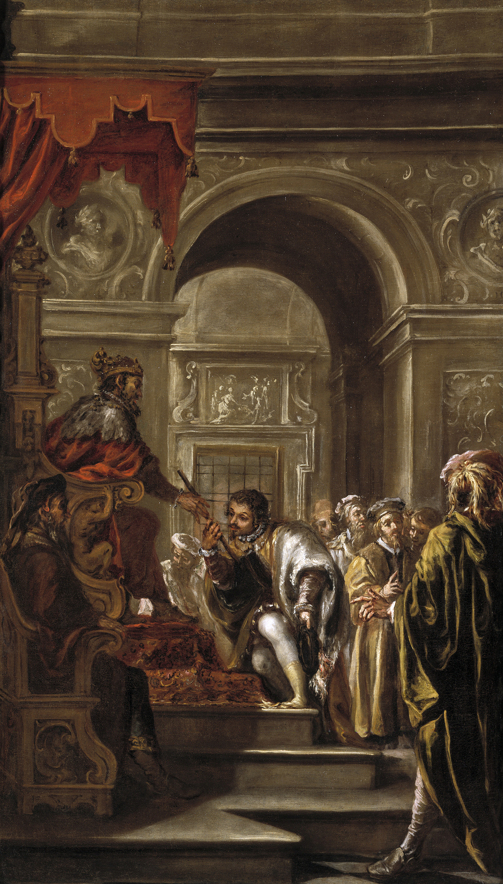 La obra representa el momento en que San Ambrosio de Milán fue nombrado gobernador de las provincias de Liguria y Emilia, con sede en la ciudad de Milán, por el cónsul Sexto Claudio Petronio Probo.